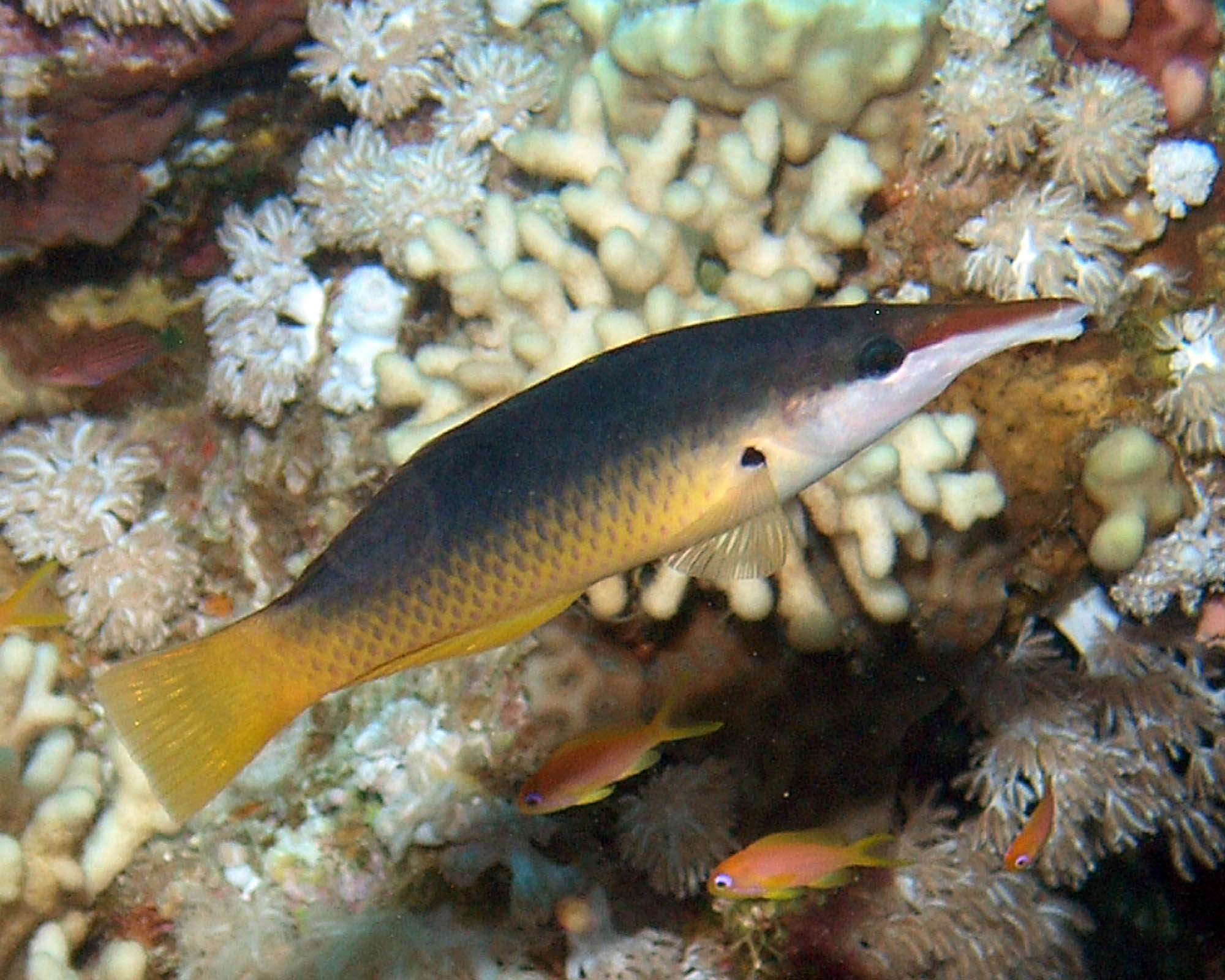 Gomphosus caeruleus; Female